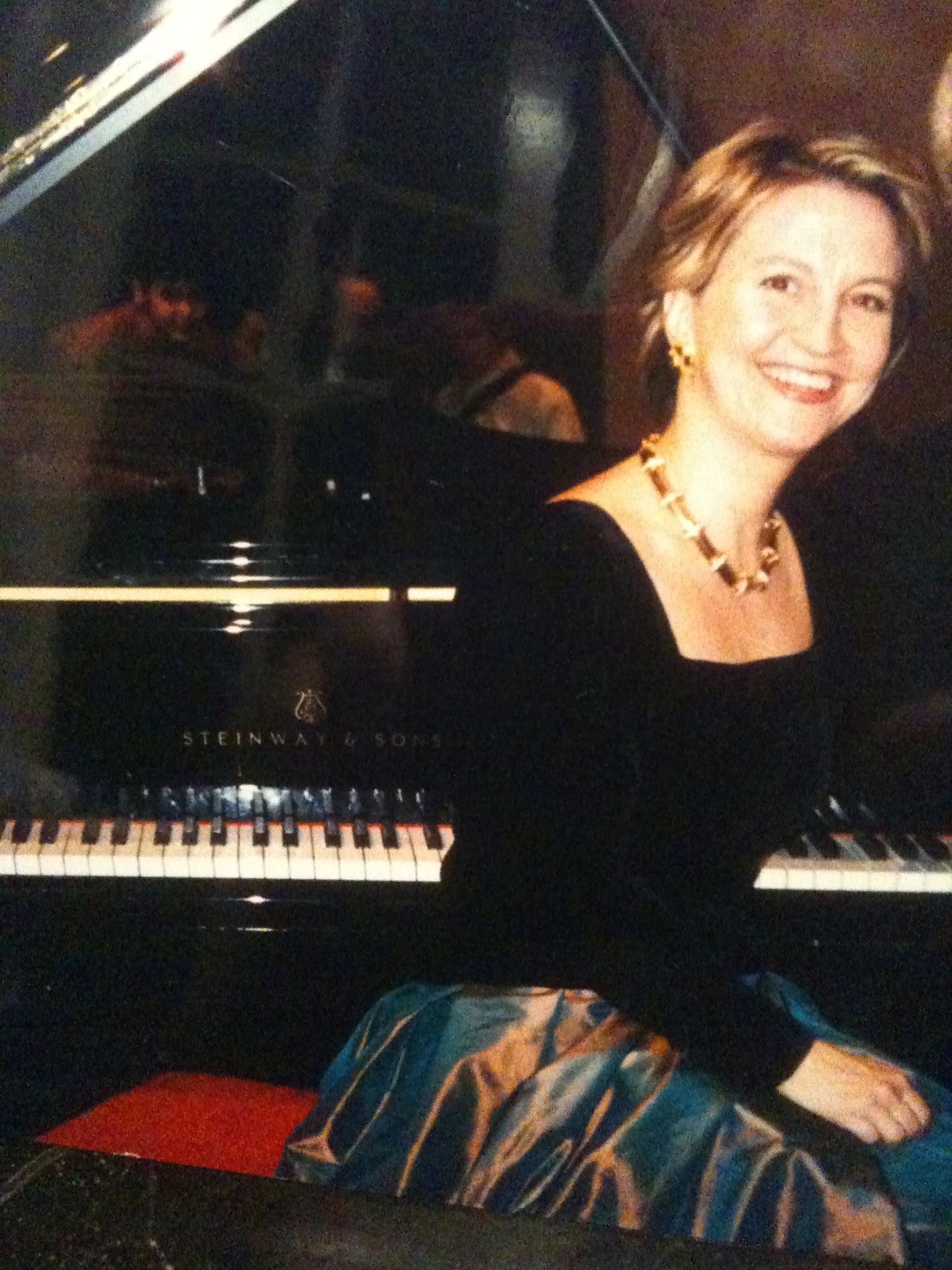 Nathalie Béra-Tagrine devant son piano